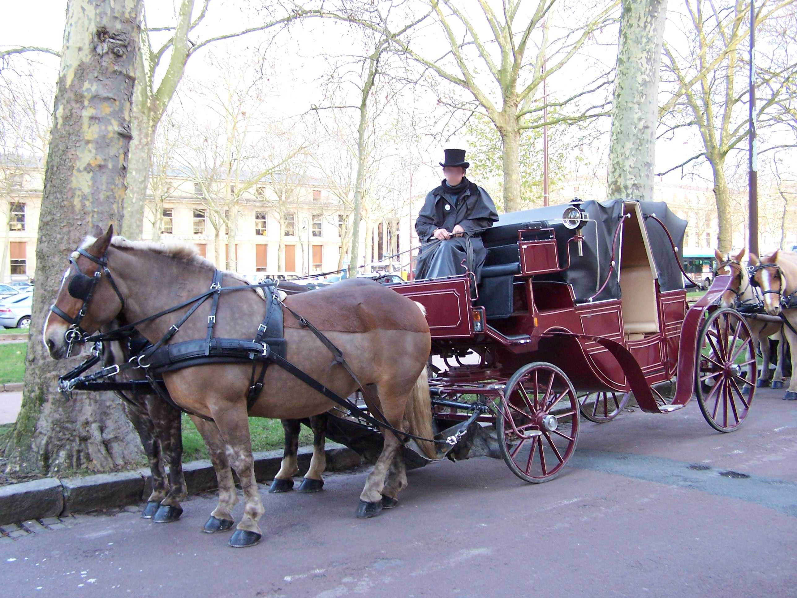 Zweispänniger Pferdewagen; Landauer in Versailles, Frankreich.